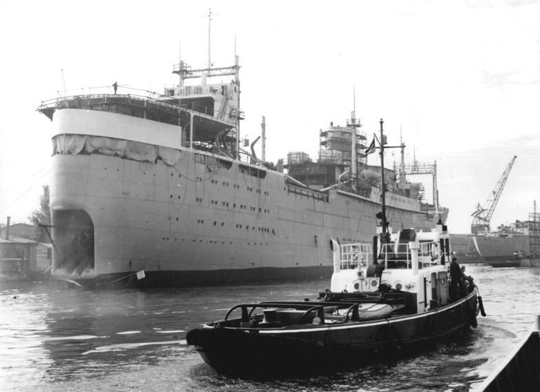 Zentralbild-Mellahn Vgt-Qu 2.11.1959 Walfänger "Jury Dolgoruky" - Geburtsstätte der sozialistischen Gemeinschaftsarbeit der Werktätigen der Werftindustrie der DDR. Der 22 000 Tonnen große Walfänger "Jury Dolgoruky" (links) wird 1960 ausgeliefert. Während bei den schiffbaulichen Arbeiten fünf "Rote Brigaden" verschiedener Werften im sozialistischen Wettbewerb standen, sind es jetzt 20 Kollektive, die um die Einhaltung der festgelegten Termine ringen. Davon ringen acht um den Titel "Brigade der sozialistischen Arbeit". Großen Anteil an der durch Verbesserung in der Warnow-Werft möglich gewordenen Einsparung von 110 000 Stunden in diesem Jahr hatten die Arbeiter auf der "Jury Dolgoruky"."